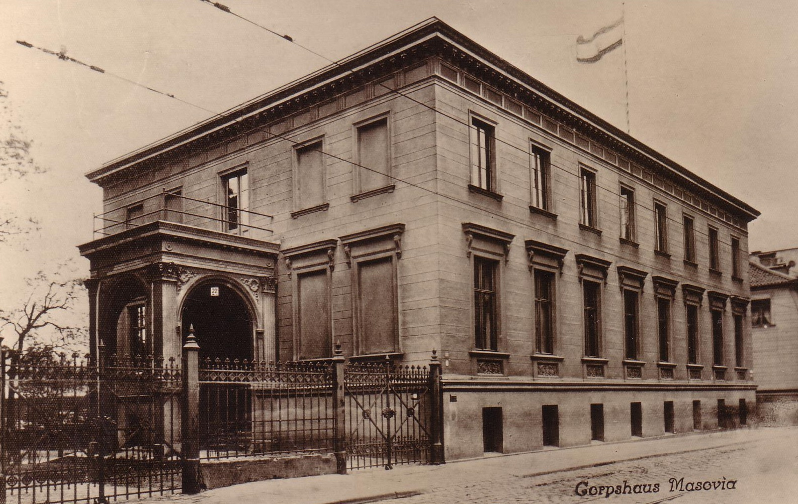 Corpshaus des Corps Masovia (von 1929-1936) am Weidendamm in Königsberg (zerstört 1945)